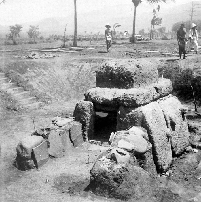 Repronegatief. Een dalmenachtige grafkelder van de laat megalitische cultuur op Oost-Java.